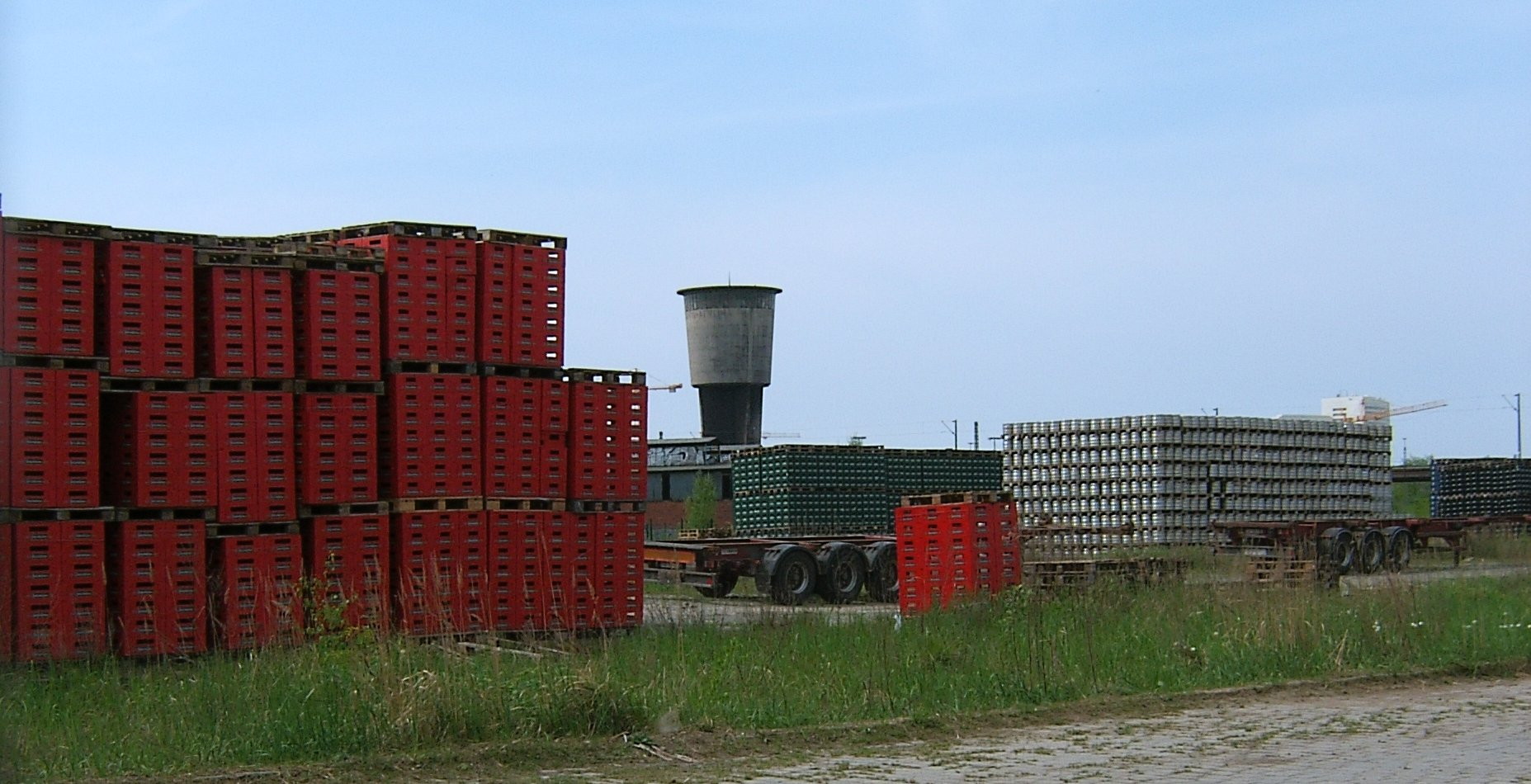 Hamburg, Altona, Bahngelände